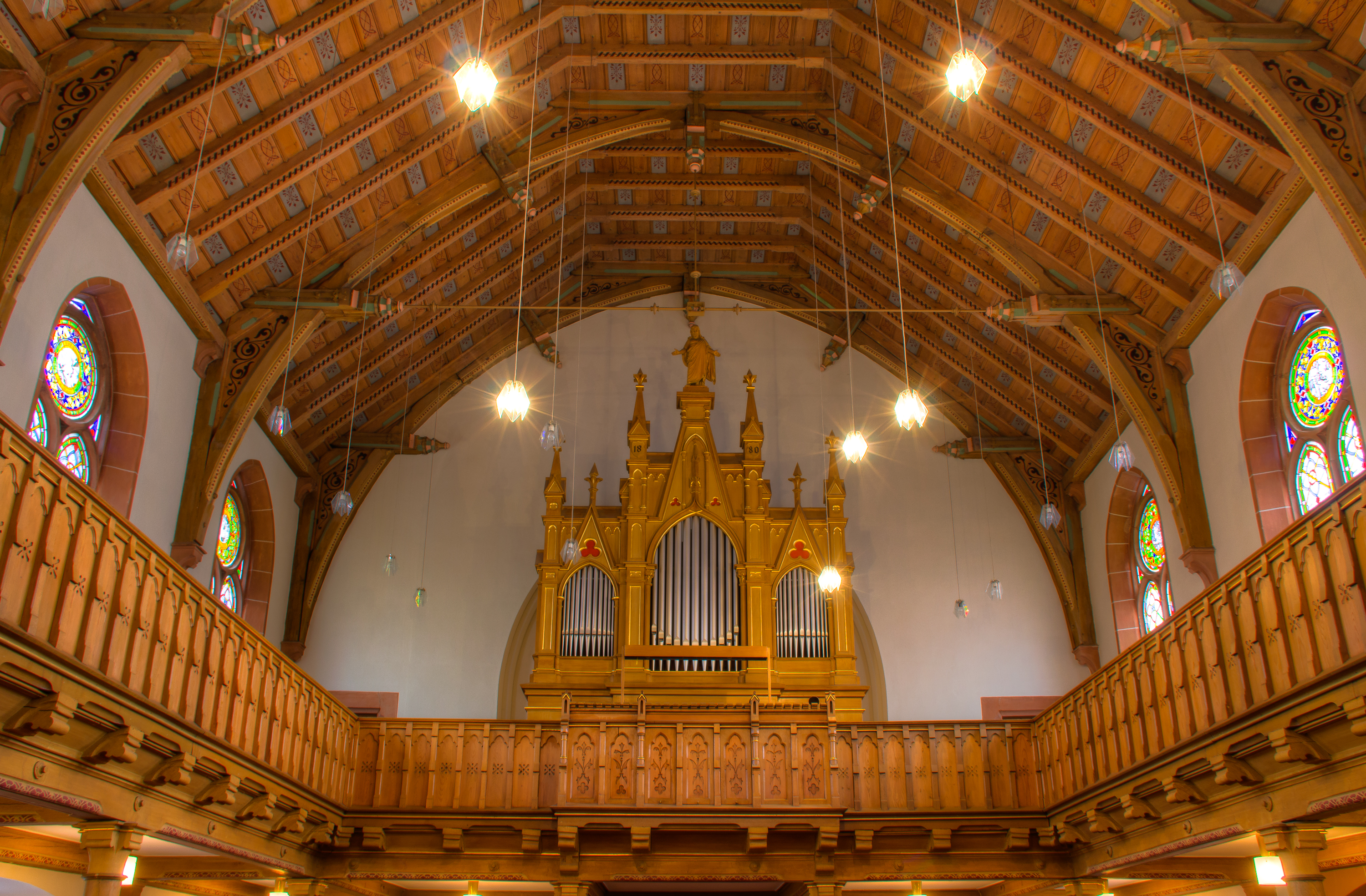 Evangelische Kirche Annerod, Gemeinde Fernwald, Landkreis Gießen in Hessen, Deutschland